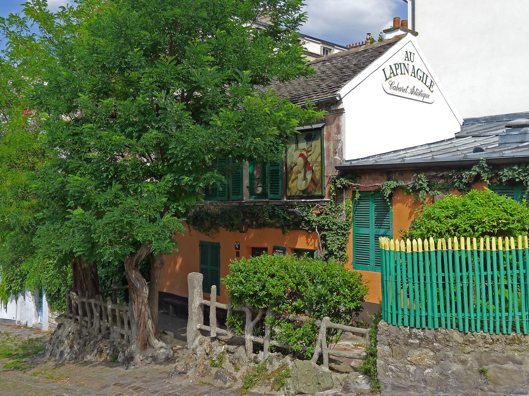 Au Lapin Agile - Paris XVIII